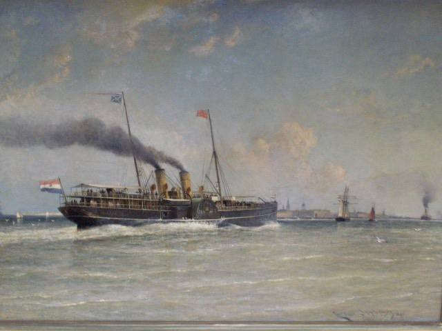 door Chr. Dommelhuizen, pseudoniem van Christiaan Dommersen